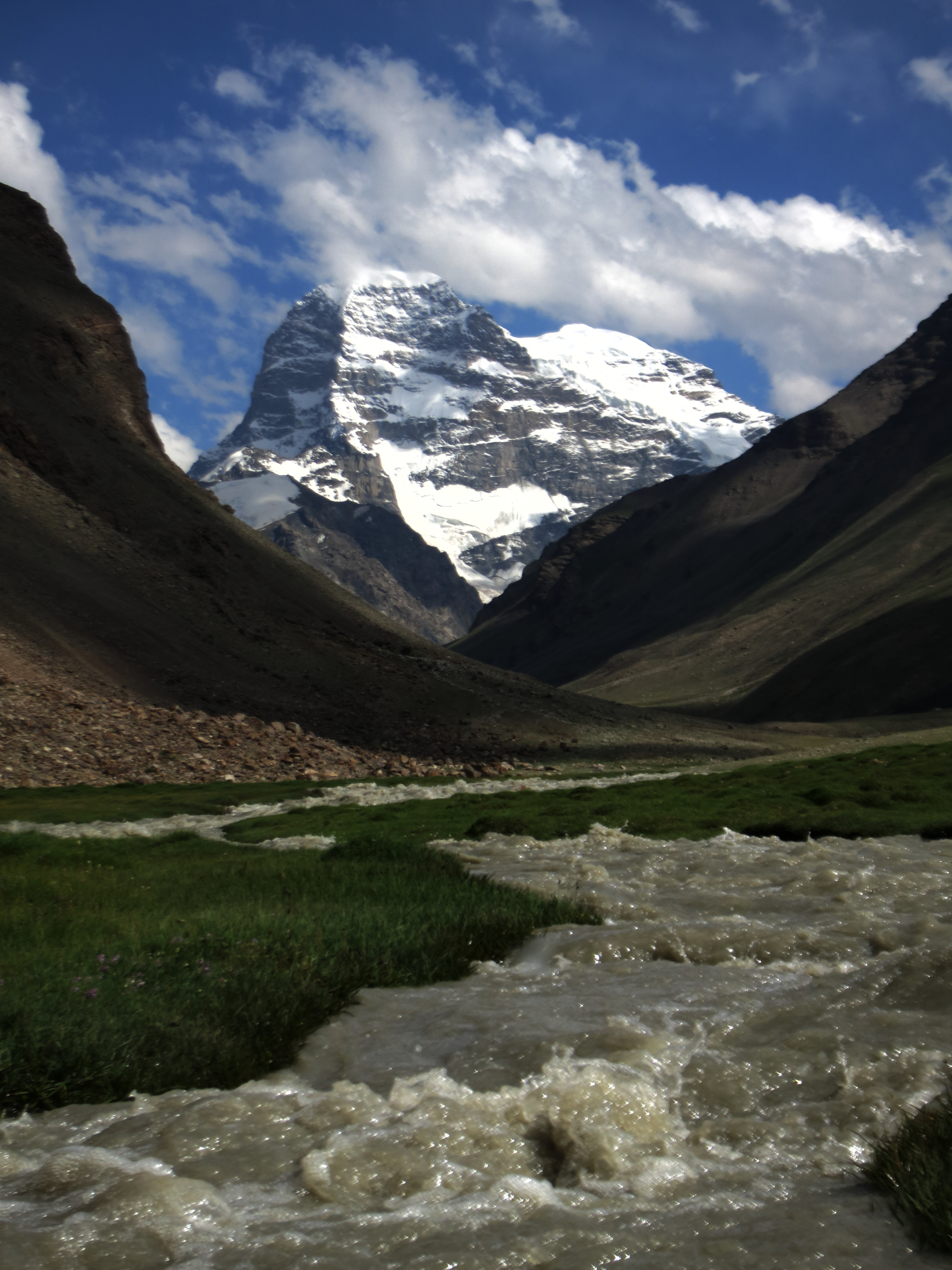 Blick aus dem Tal von Norden